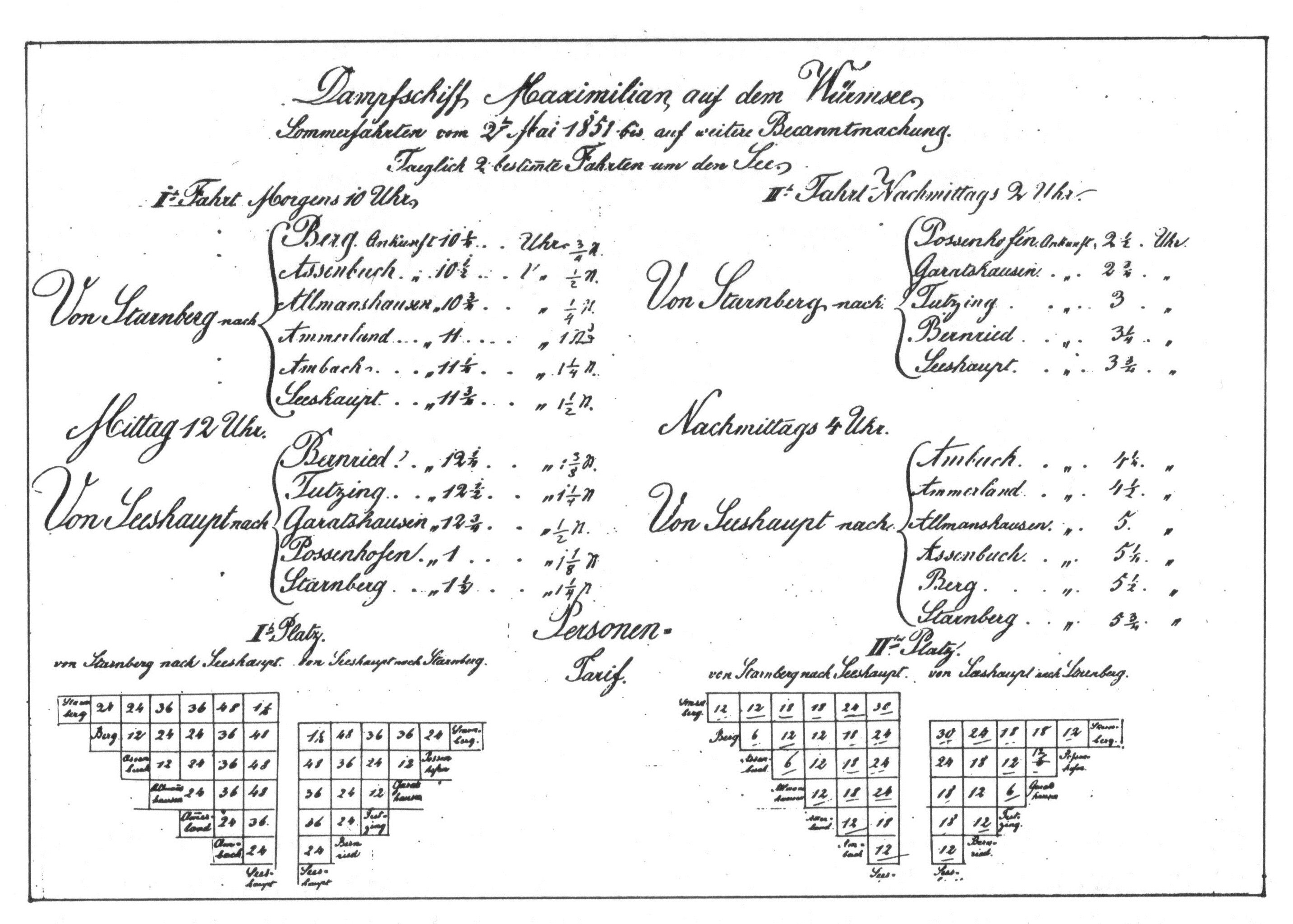 Johann Ulrich Himbsels erster Fahrplanentwurf für die Maximilian